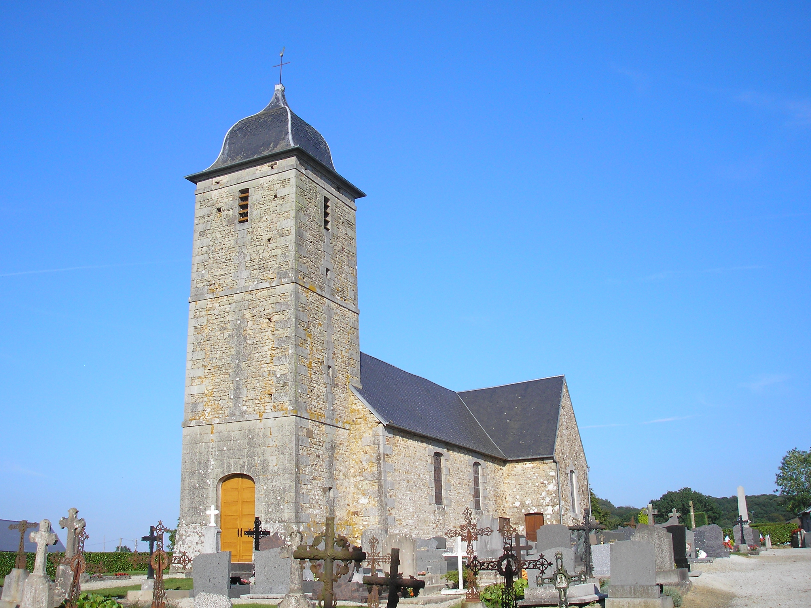 Bourguenolles (Normandie, France). L'église Saint-Barthélémy.